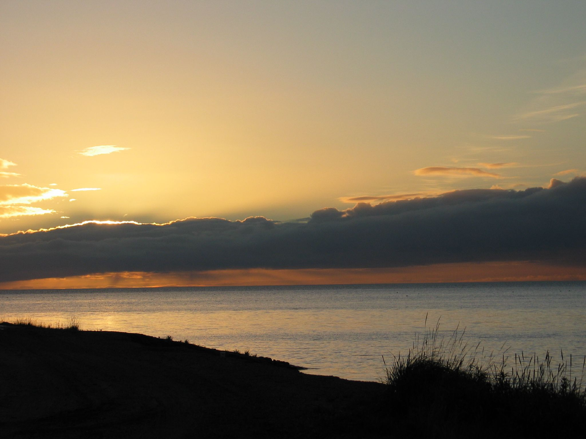 Sunset in Kotzebue